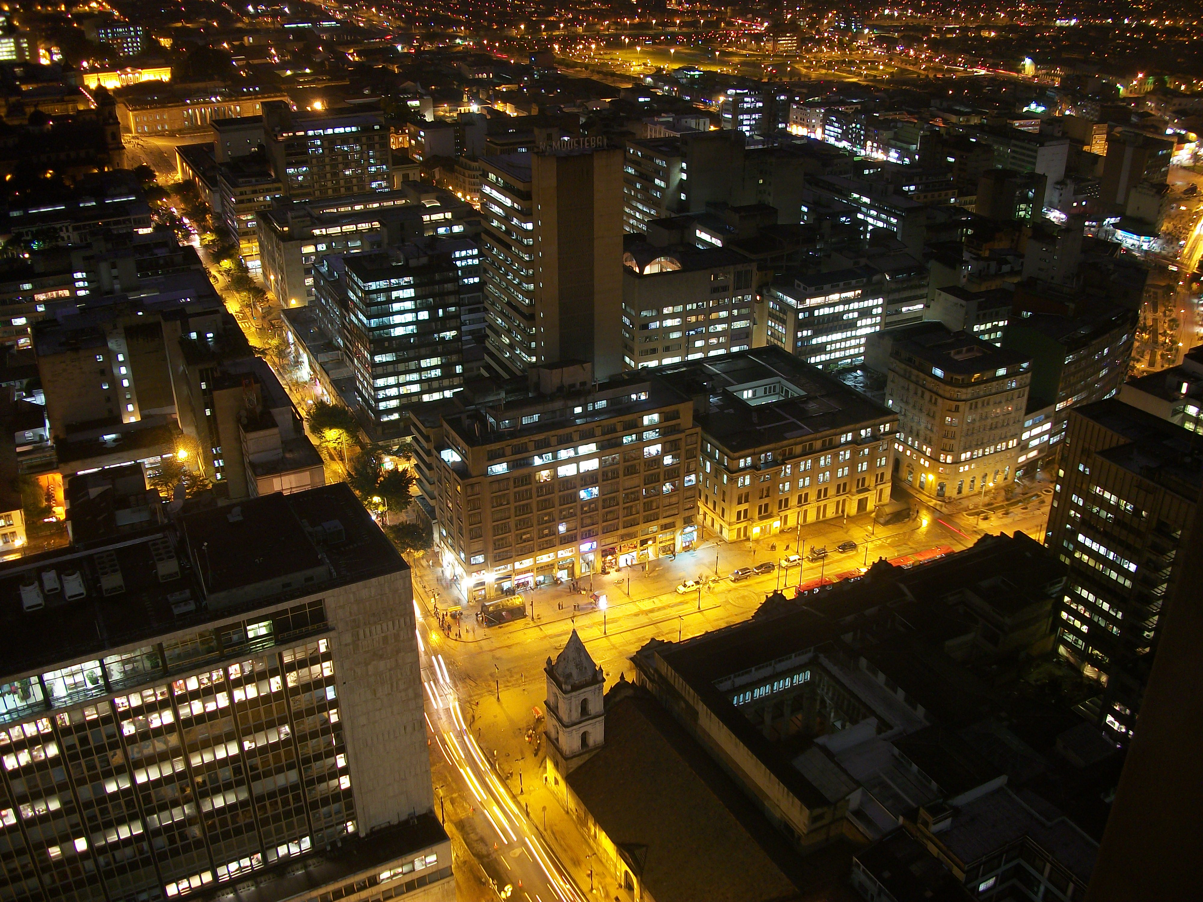 Vista del centro de Bogotá, en primer plano iglesia de San Francisco en el Eje ambiental; detrás el parque del Tercer Milenio.